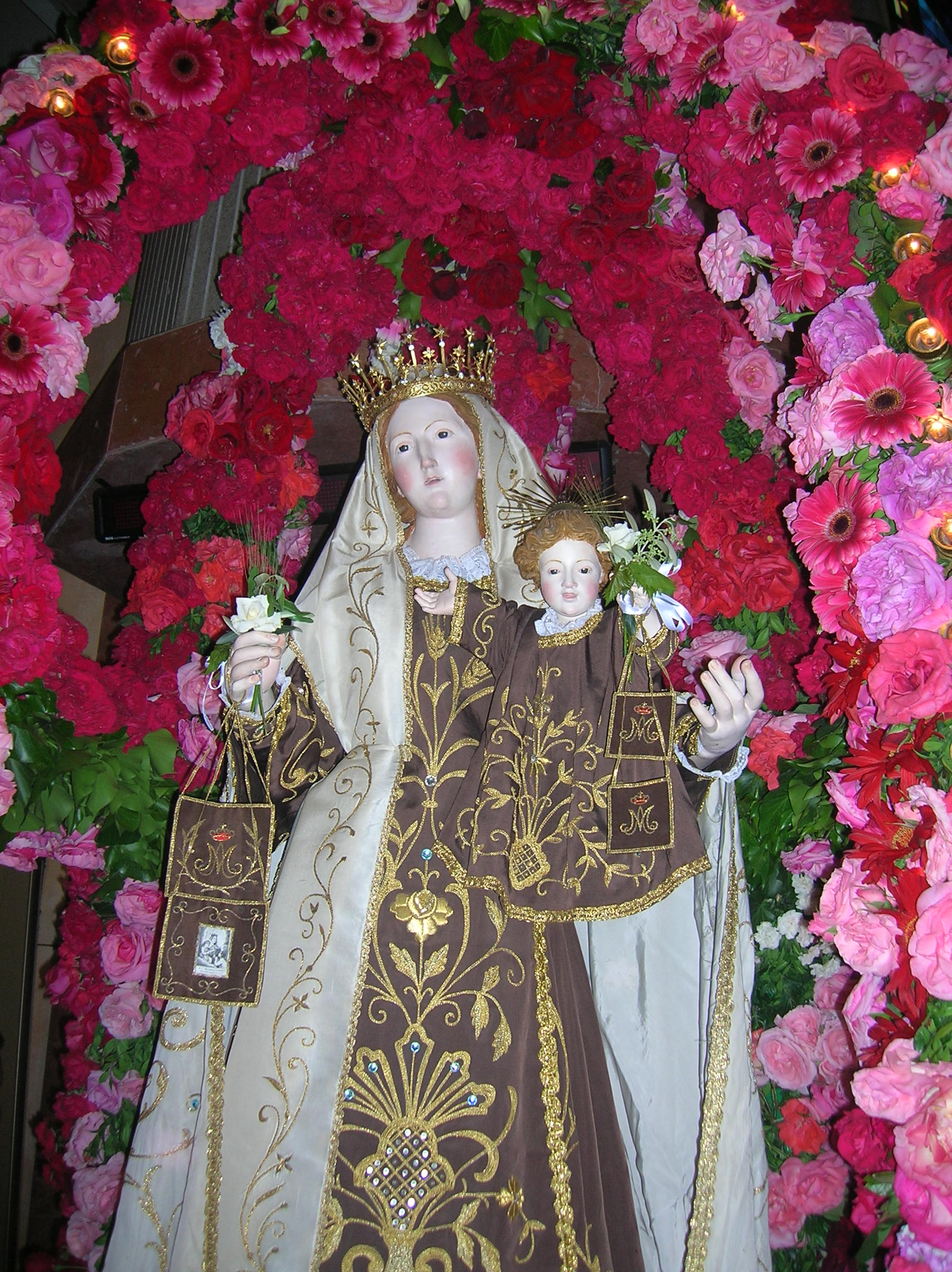 Madonna del Carmelo nelle Rose in Sturno, provincia di Avellino, Italia.